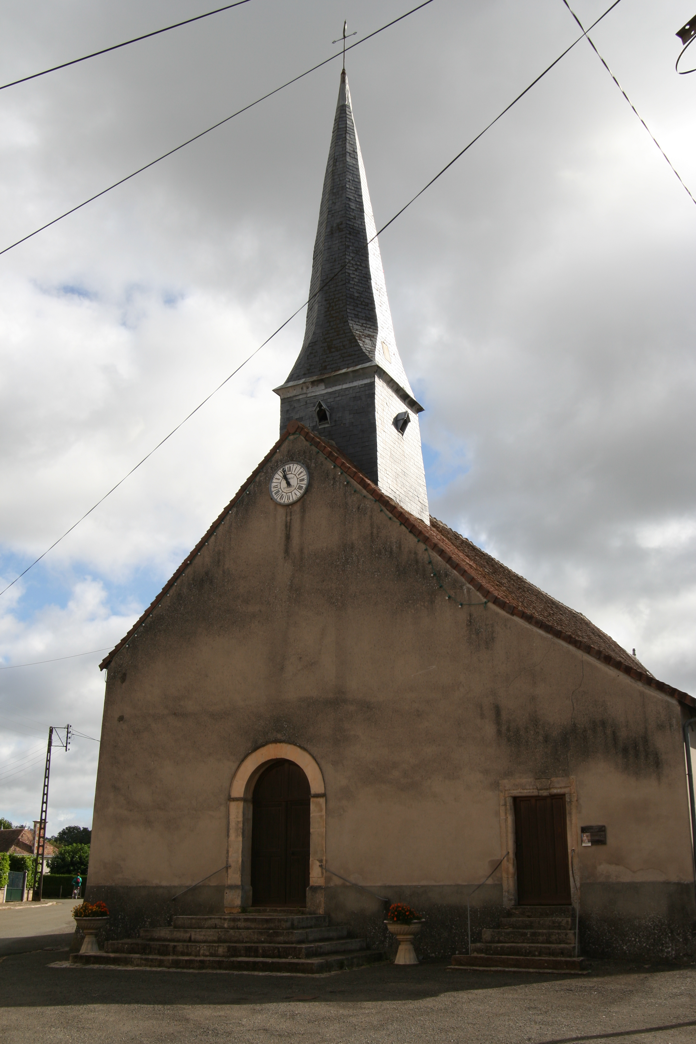 L'église de Saint-Aignan.